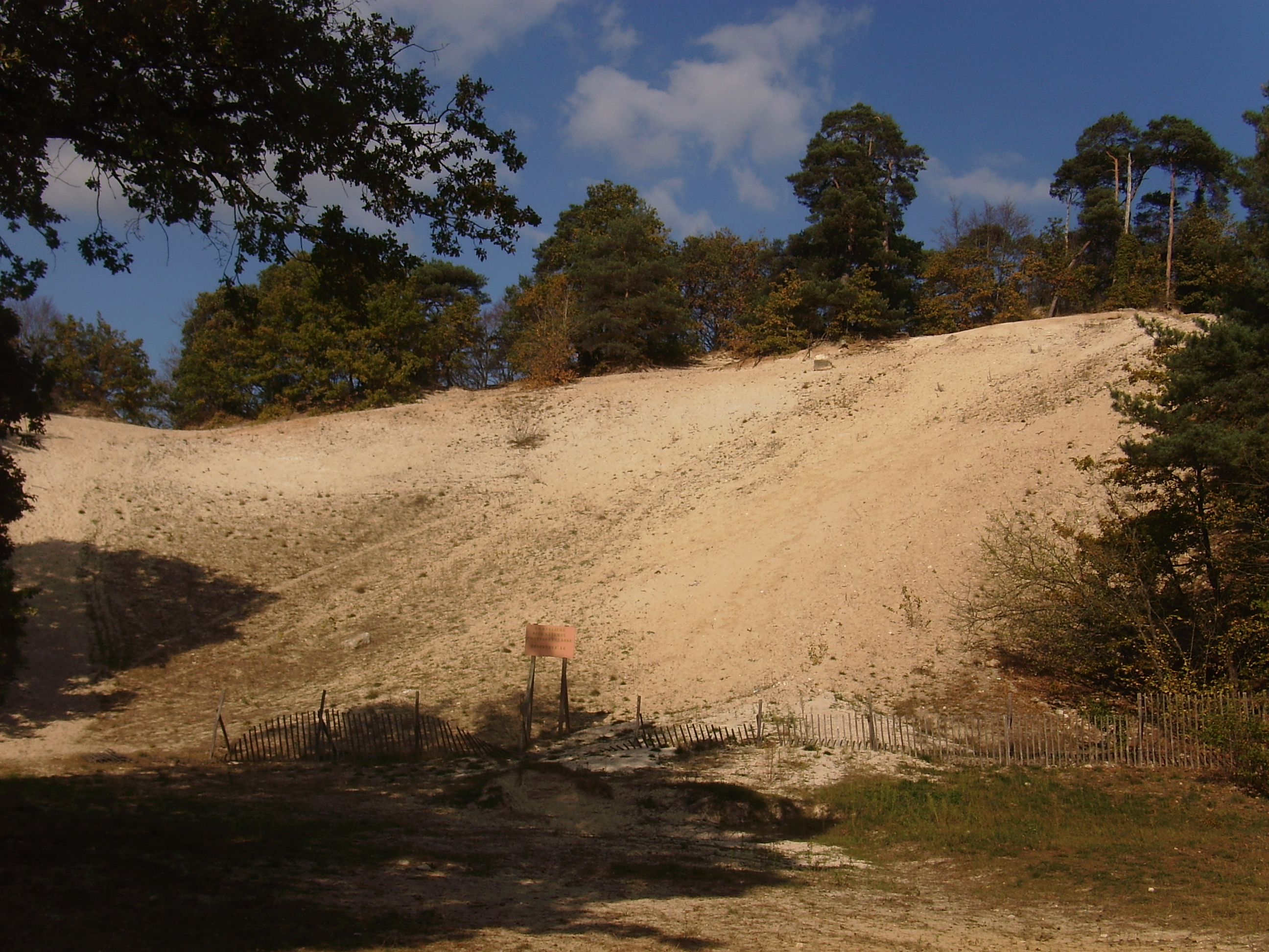 La sablière de La Ferté-Alais (91)